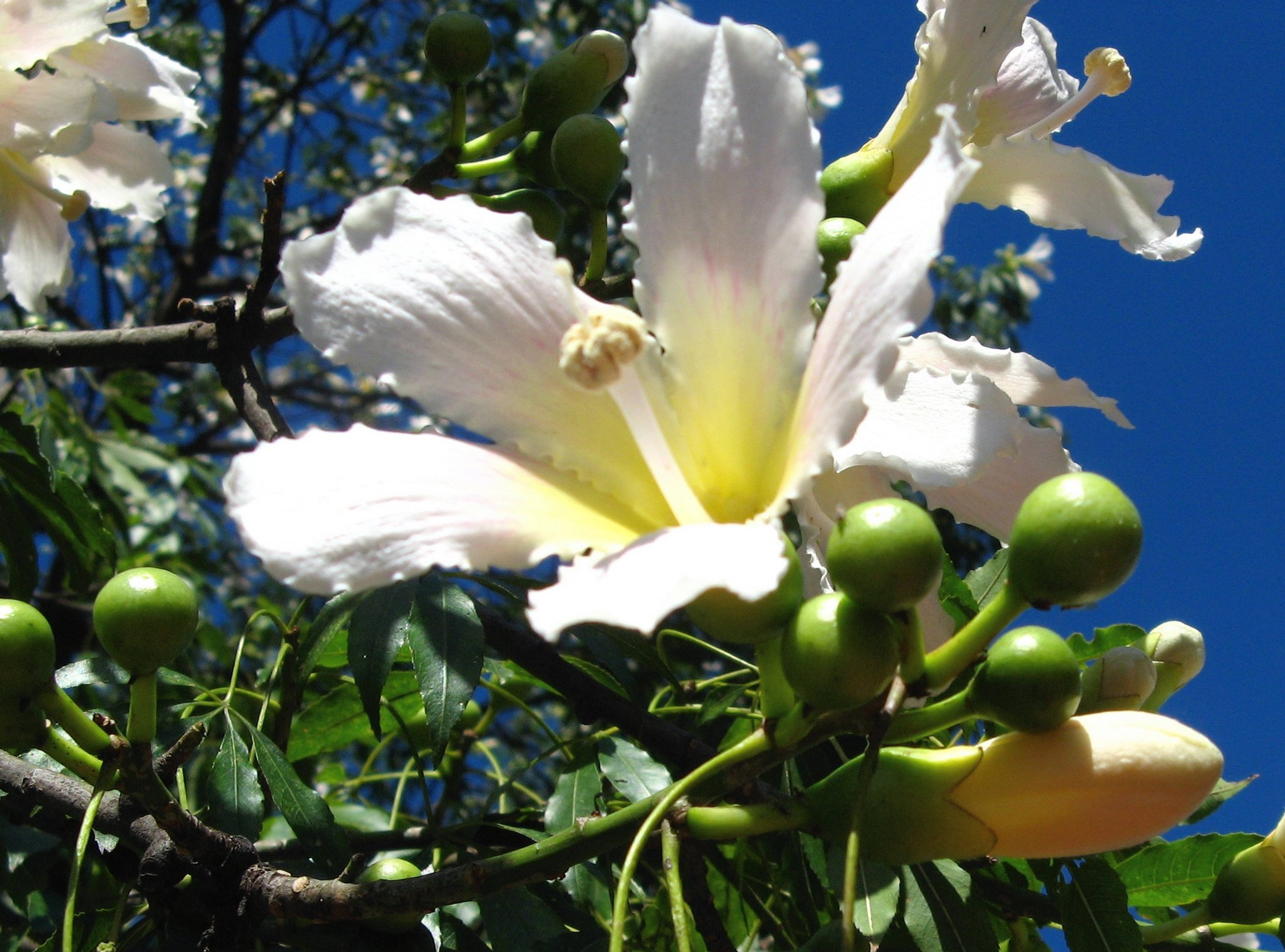 paineira branca Ceiba glaziovii Park ceret sao paulo Brasil